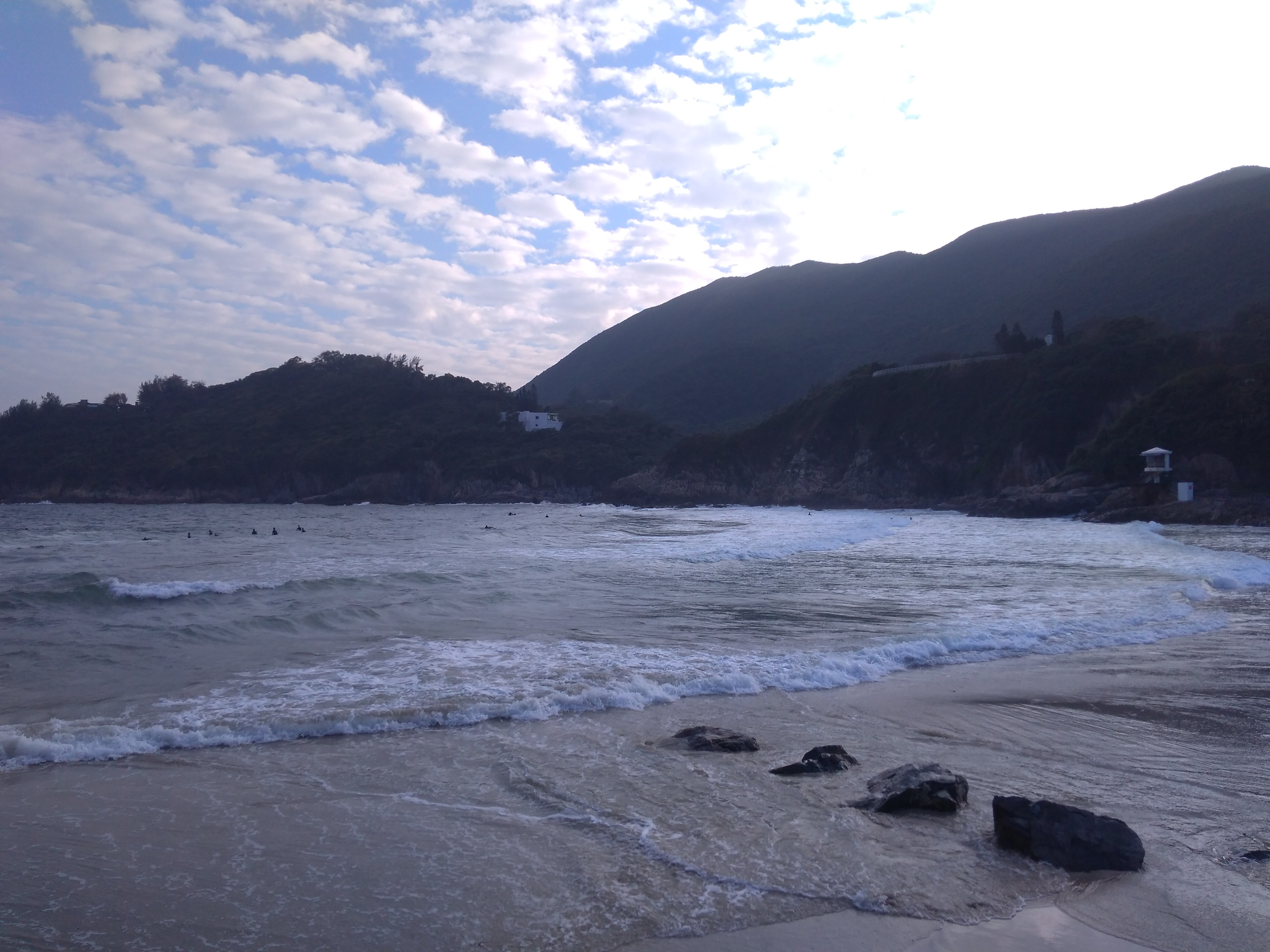 Big Wave Bay, Hong Kong Island